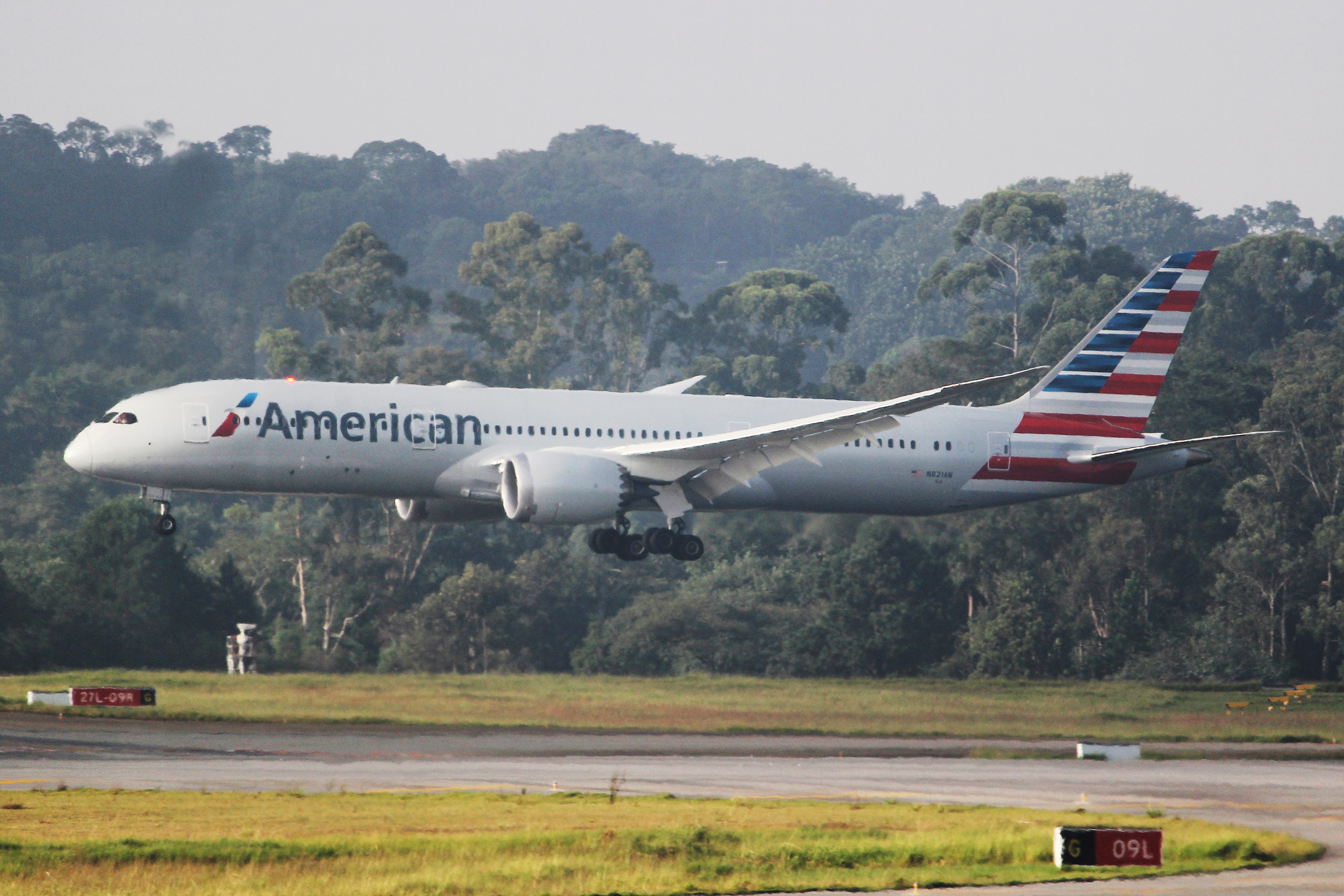 787-9 AMERICAN SBGR